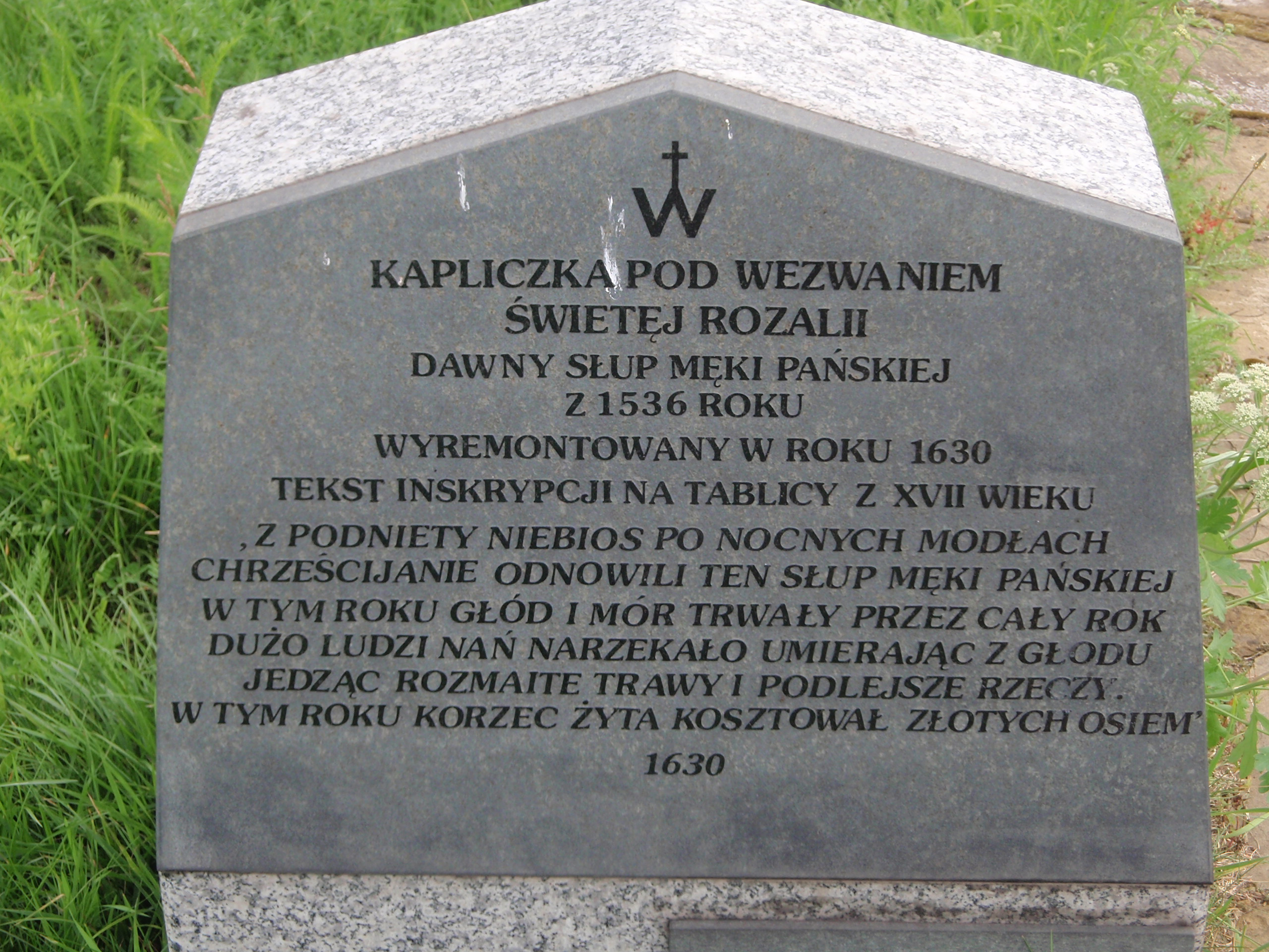 Tablica przy kapliczce św. Rozalii_w_slawkowie (woj. śląskie)